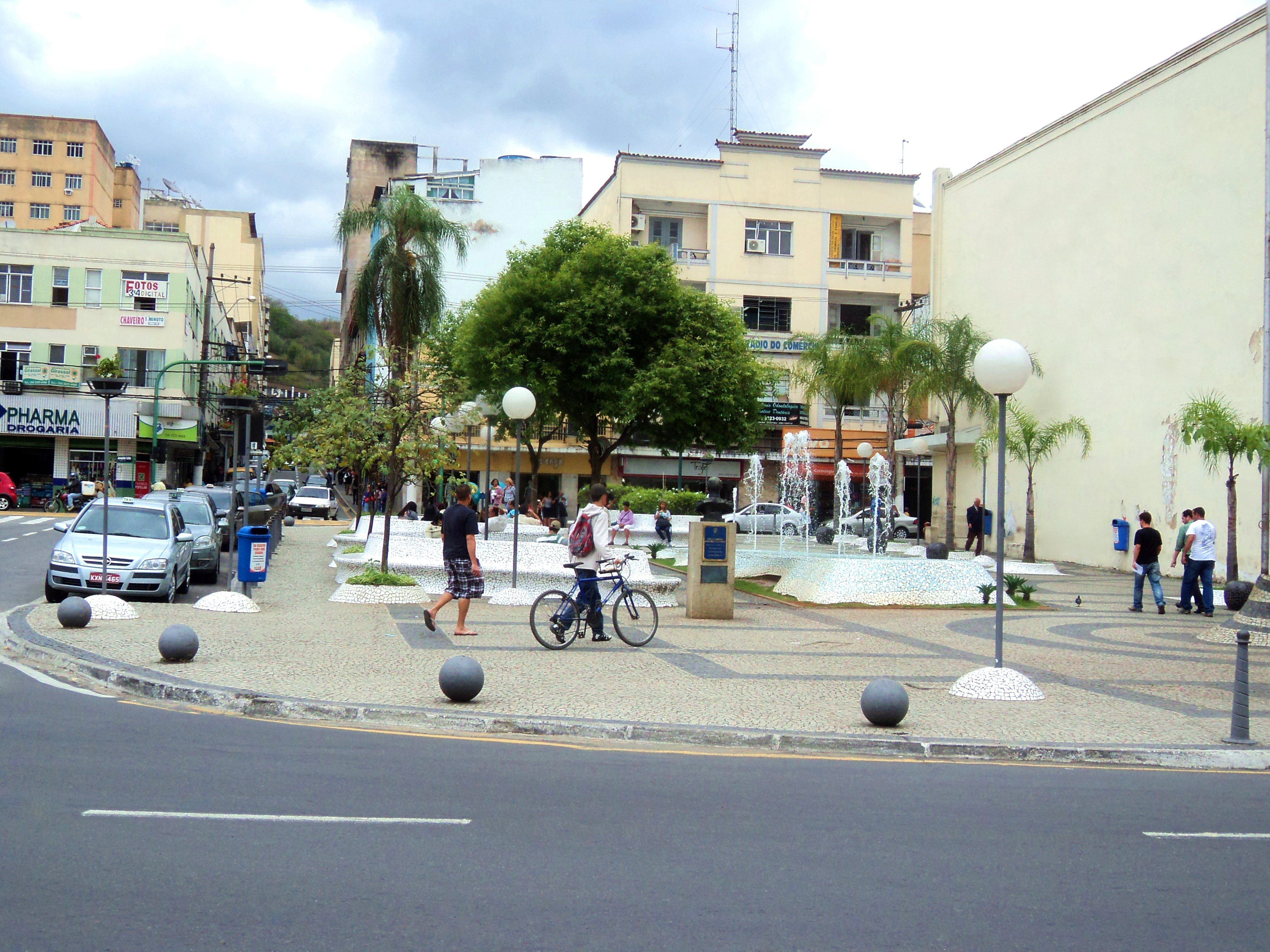 Imagem da praça da liberdade no centro Barra Mansa, estado do Rio de Janeiro, Brasil.